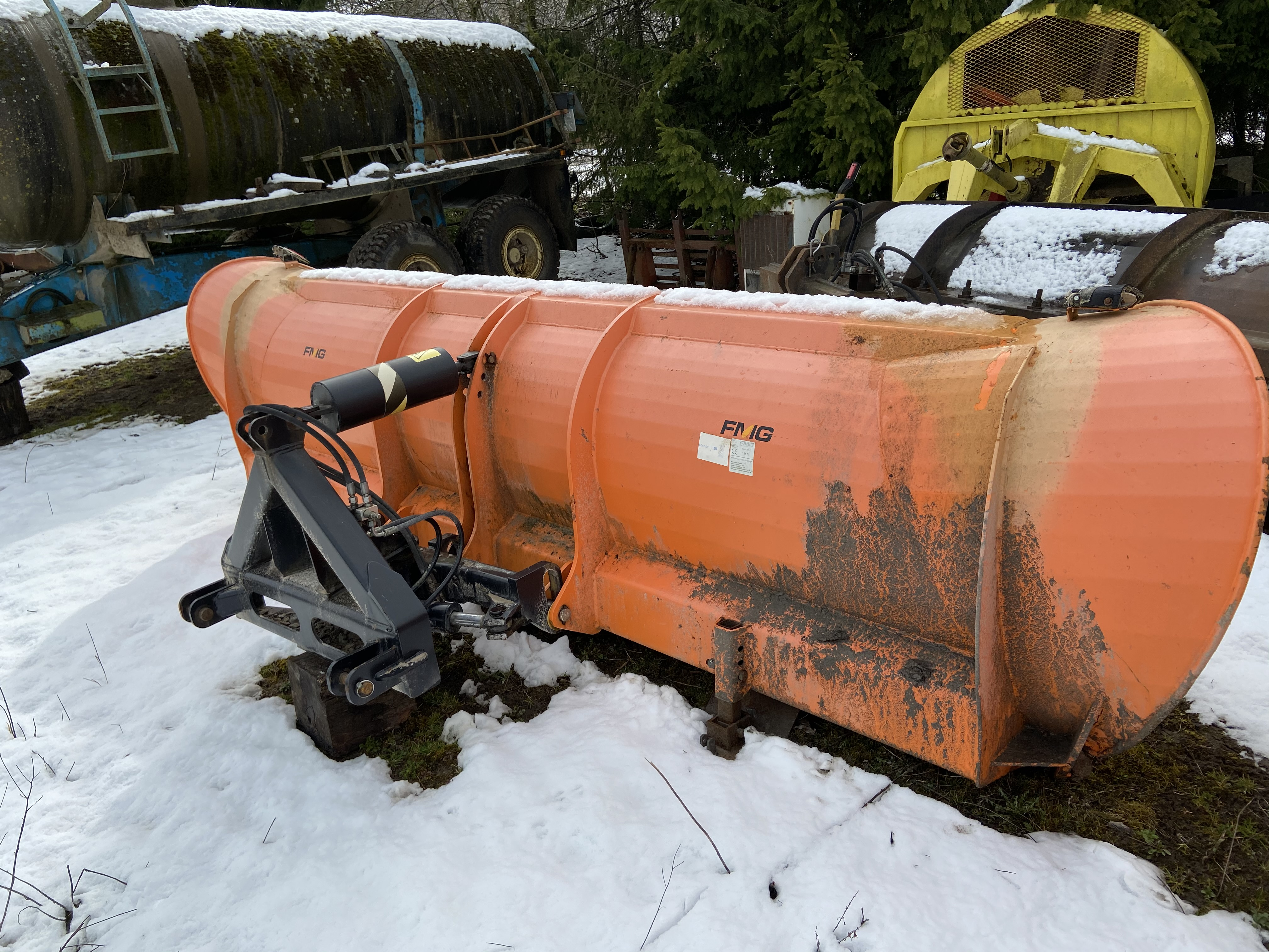 Lumesaha tagant vaade